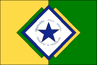 Bandeira do município de Brasileira, Piauí, Brasil.